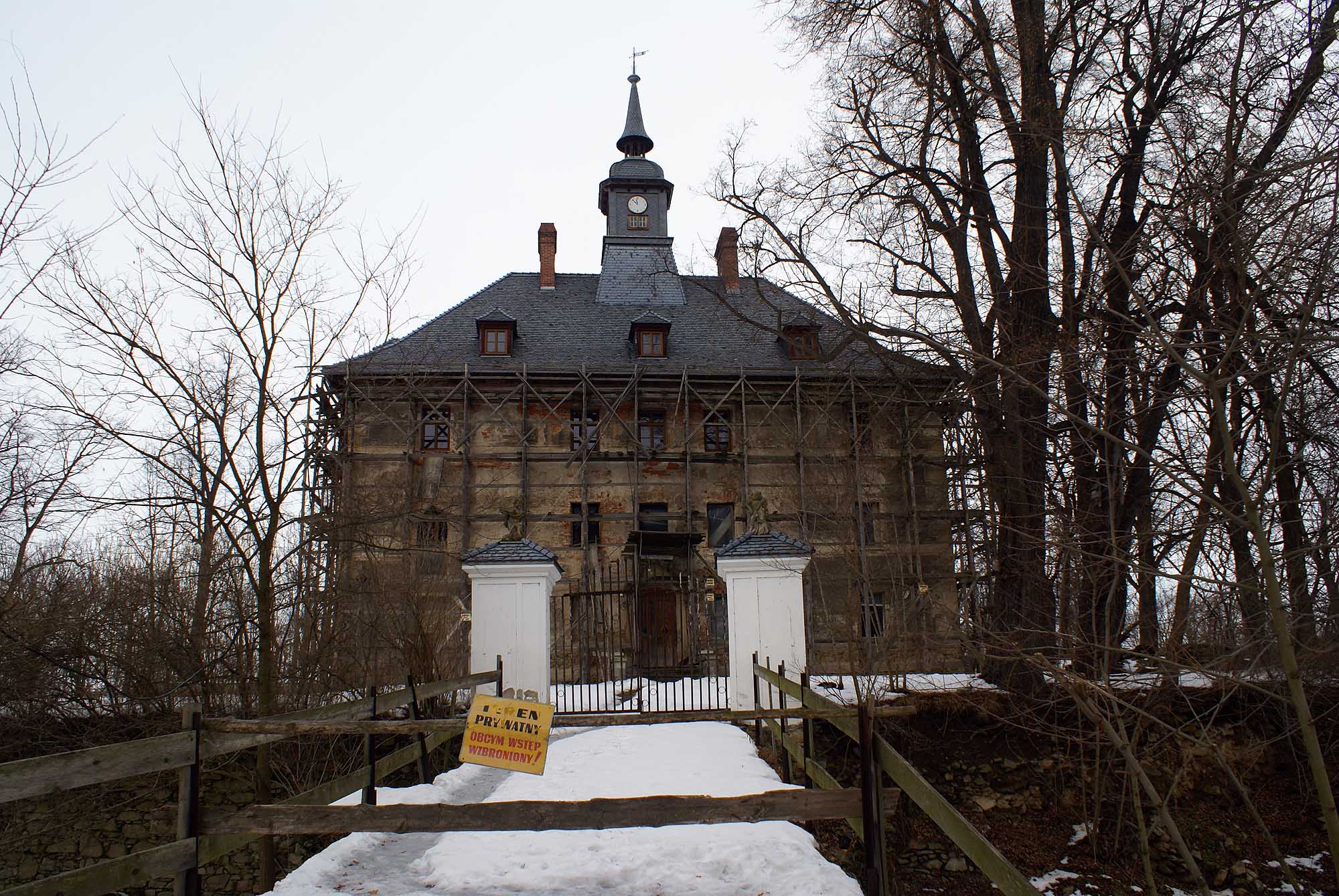 Bagieniec, dwór (na wyspie), XVI, XIX/XX